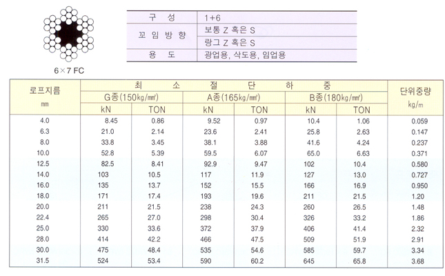 와이어 인장력에 대한 설명표